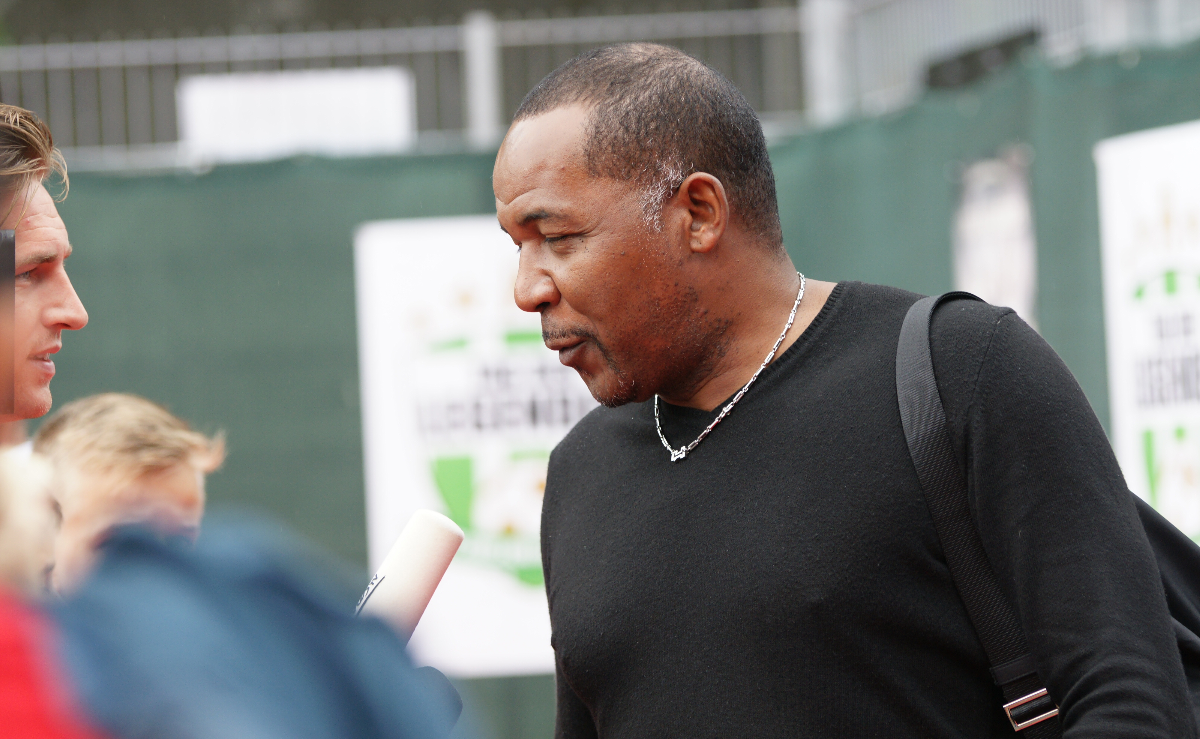 Tag der Legenden 2014 - Die Kapitäne entern Hamburg Fußballfest am Millerntor zugunsten NestWerk eV